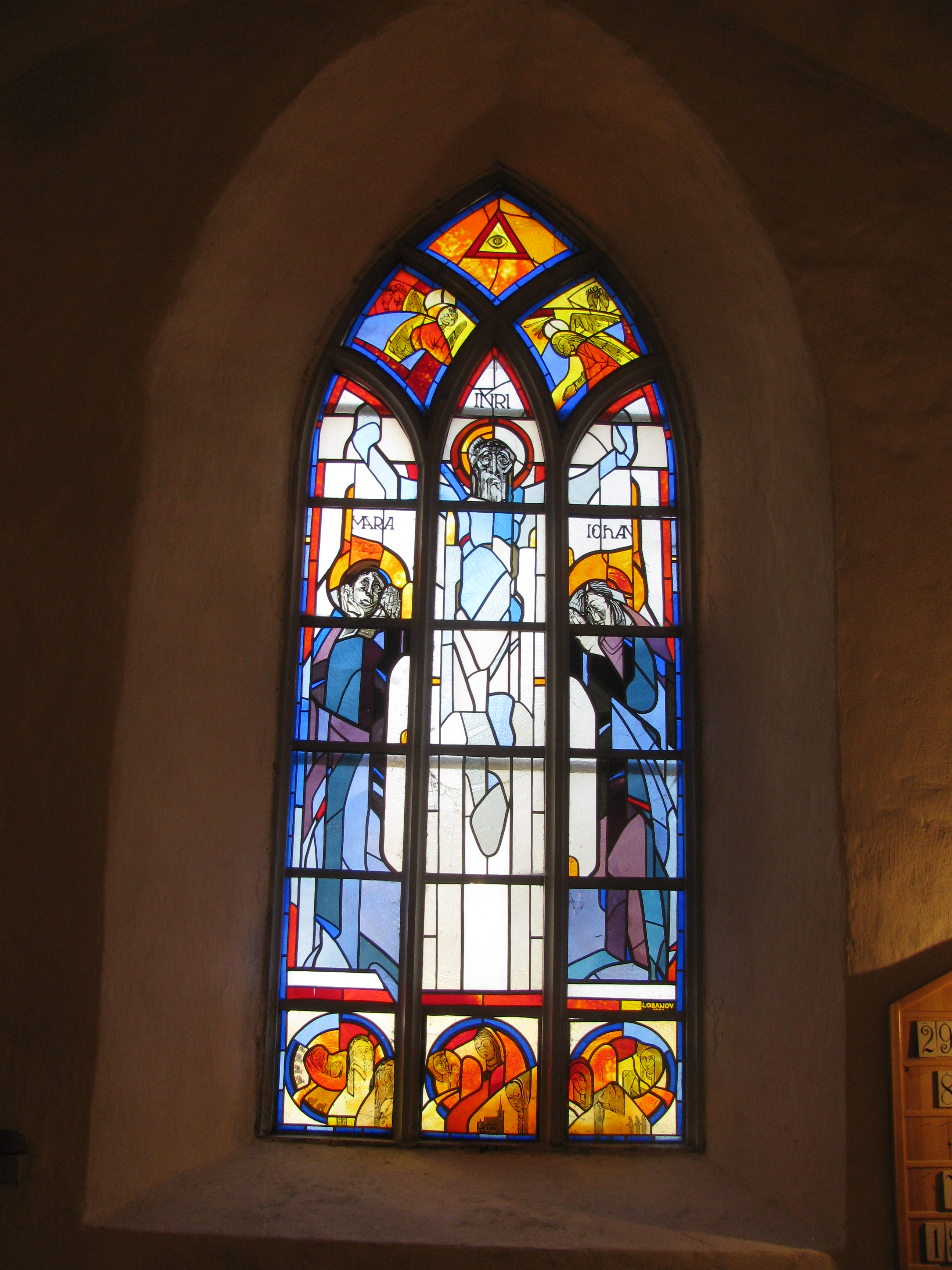 Kunstnik Lobanov, 1989